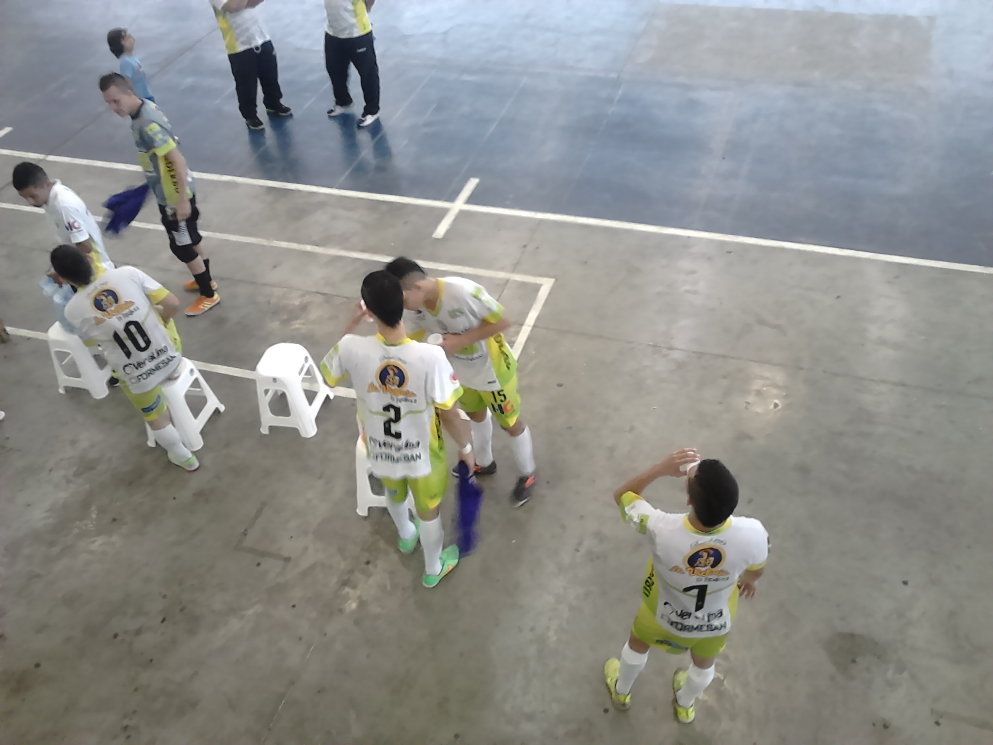 Primer partido de las Semifinales de la Liga Argos 2016-I en el cual el Club Deportivo Lyon venció 2-0 al Real Bucaramanga.